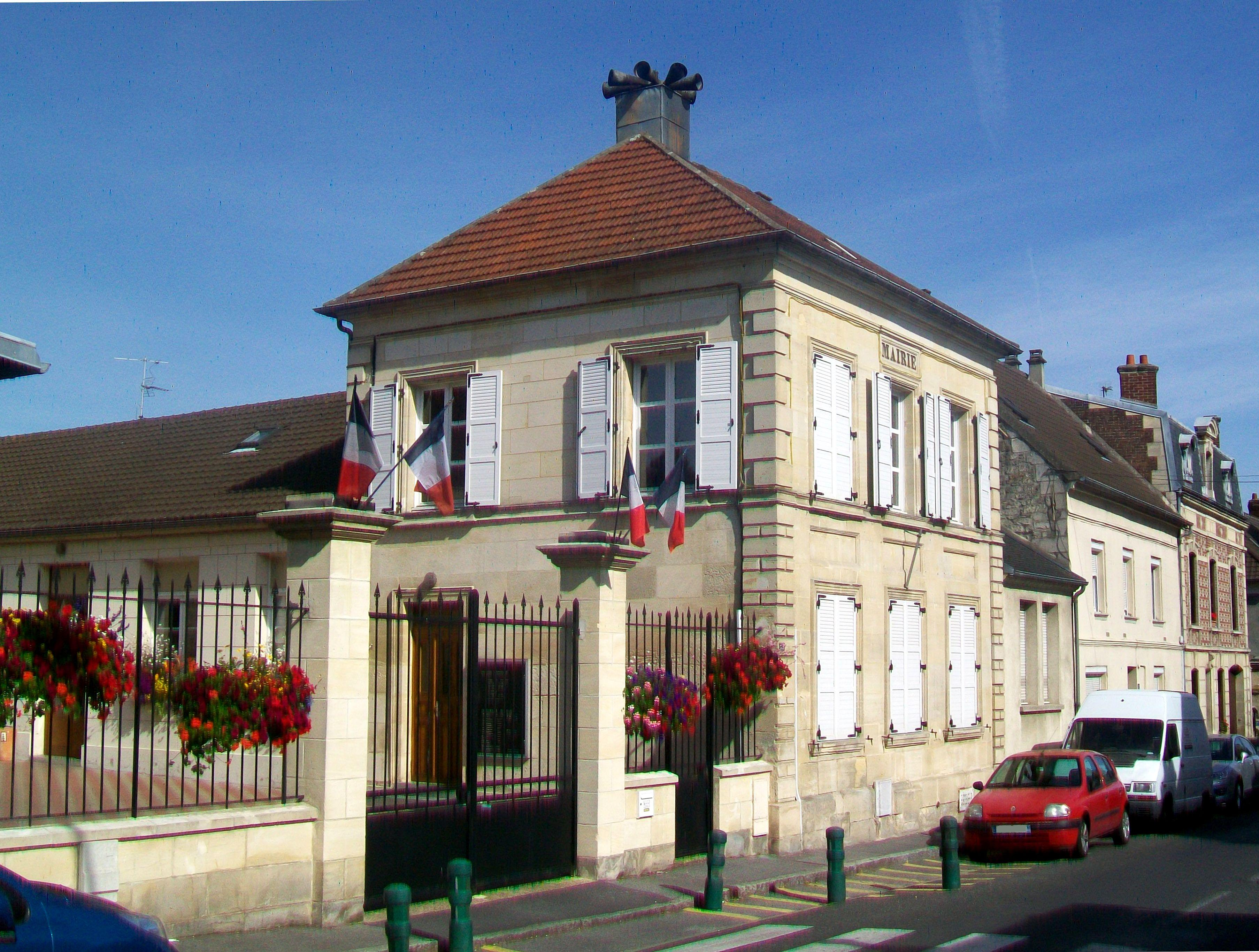 La mairie de Rantigny.